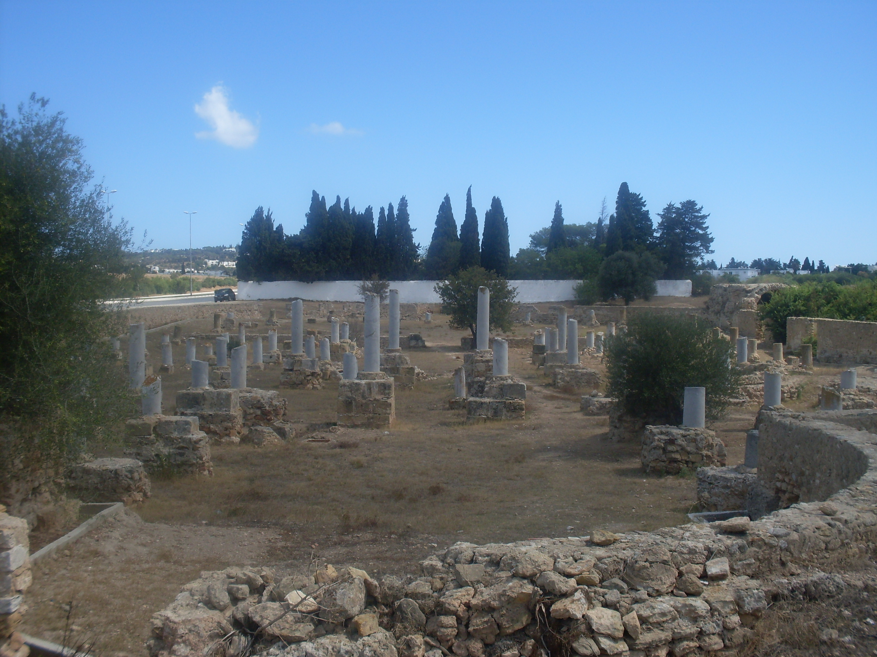 Tunisie, Carthage, Basilique Damoue el Karita